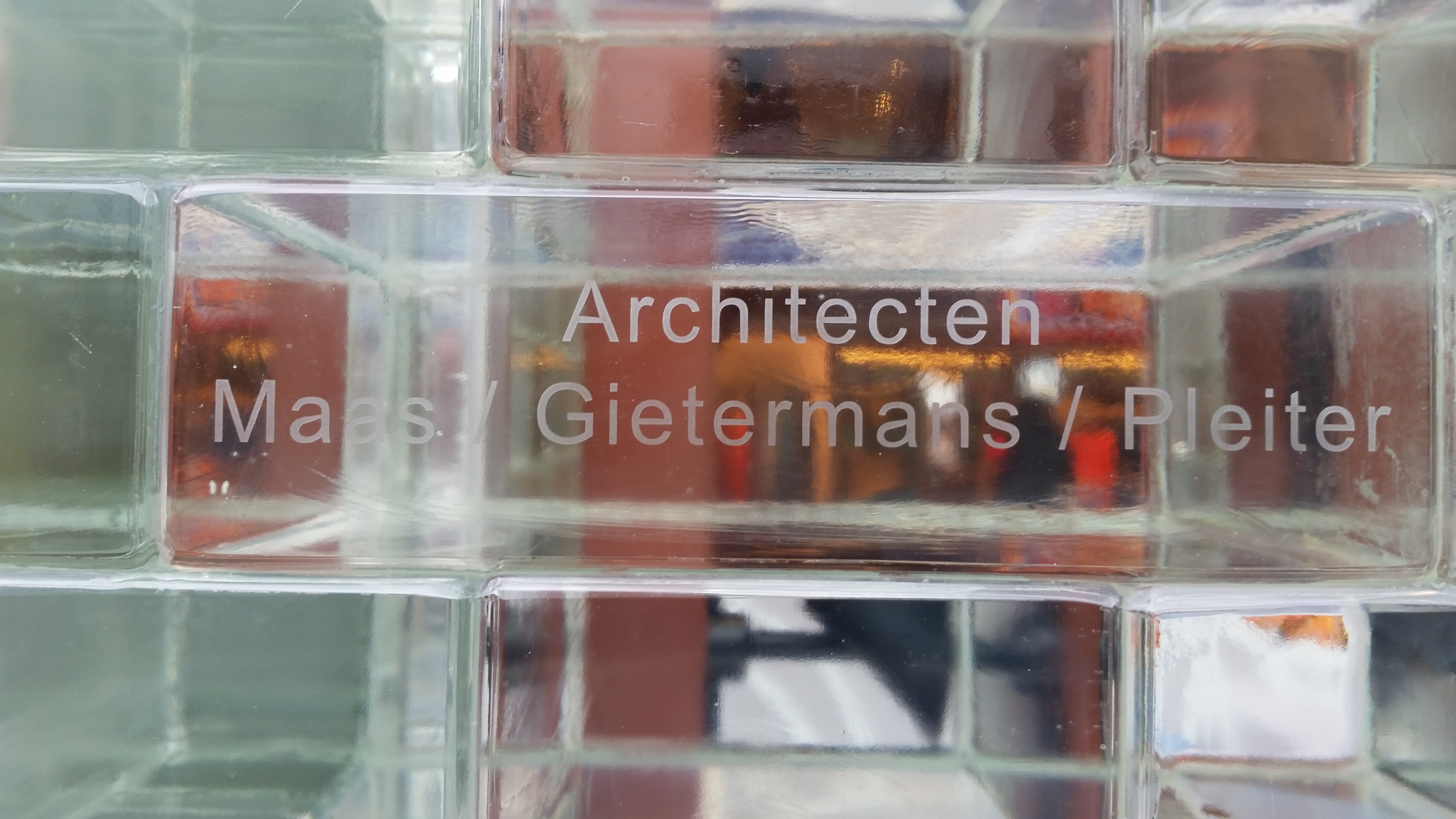 Glasblok met namen architecten van P.C. Hooftstraat 94, Amsterdam